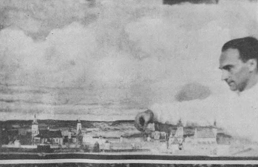 inż. Janusz Witwicki przy pracy